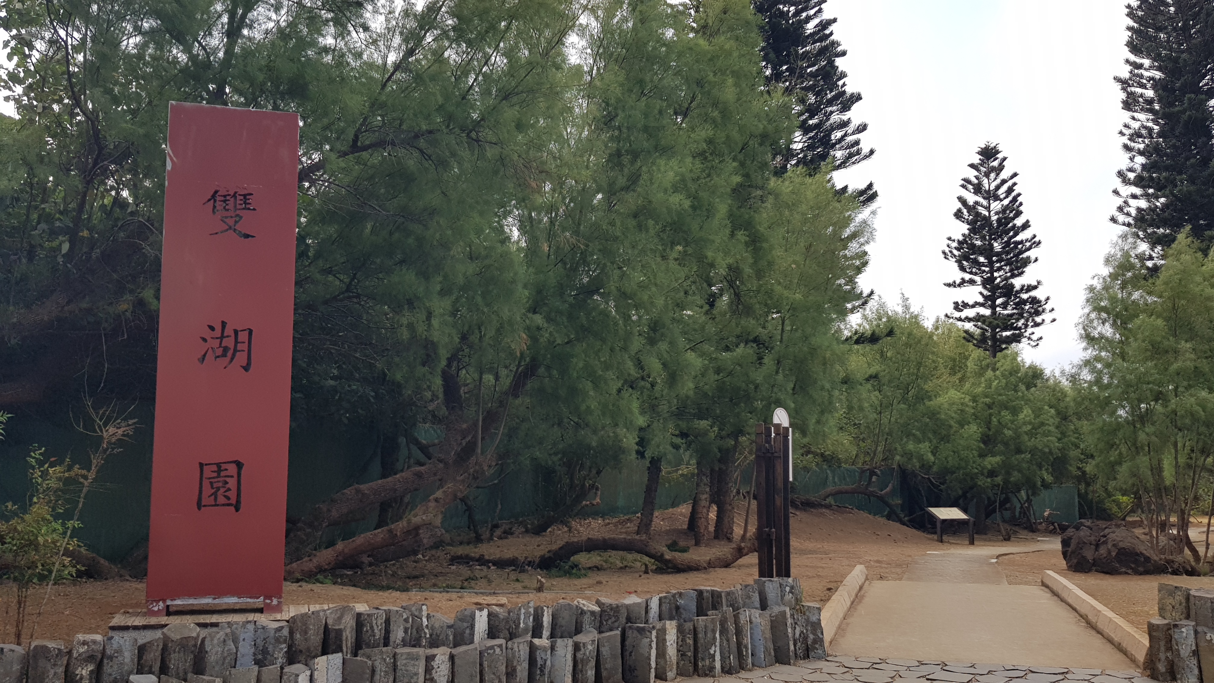 雙湖園-入口處